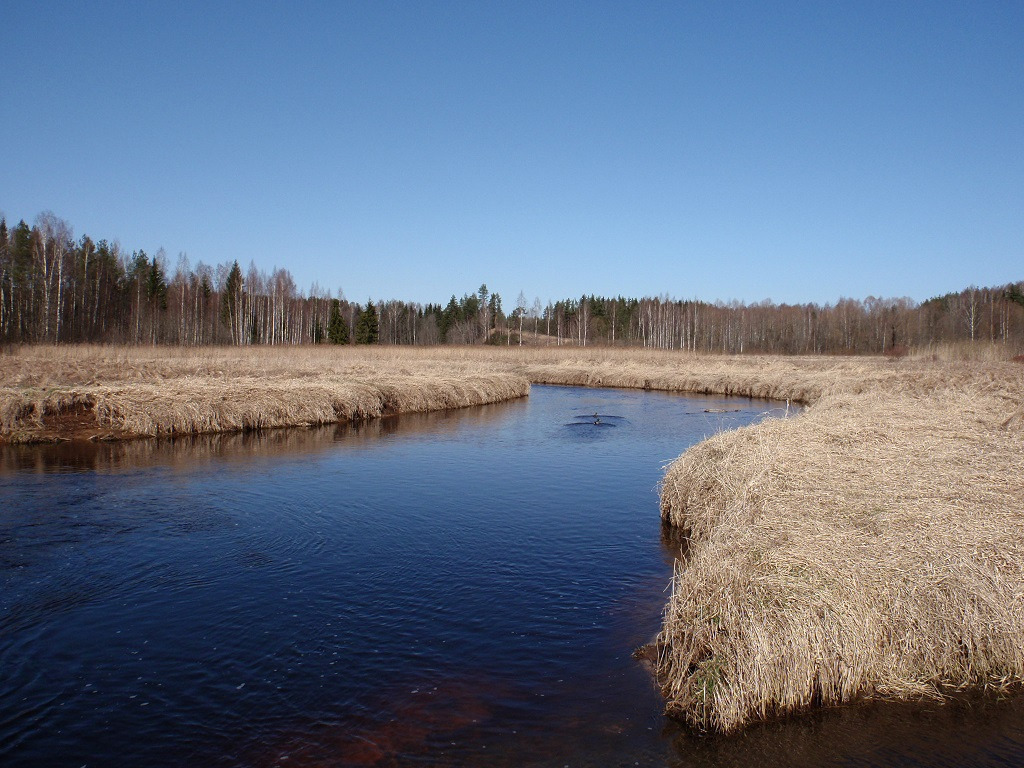 Orajõgi Himmaste külas